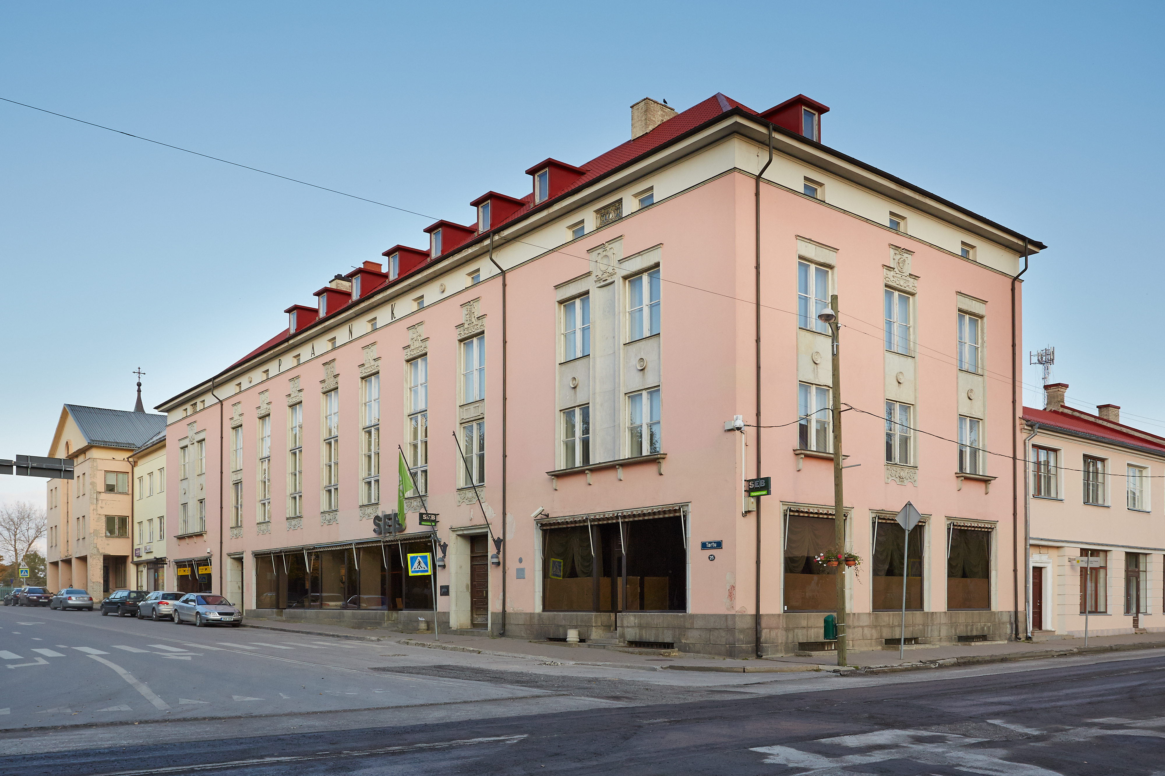 Pangahoone Võrus, Tartu tn 25